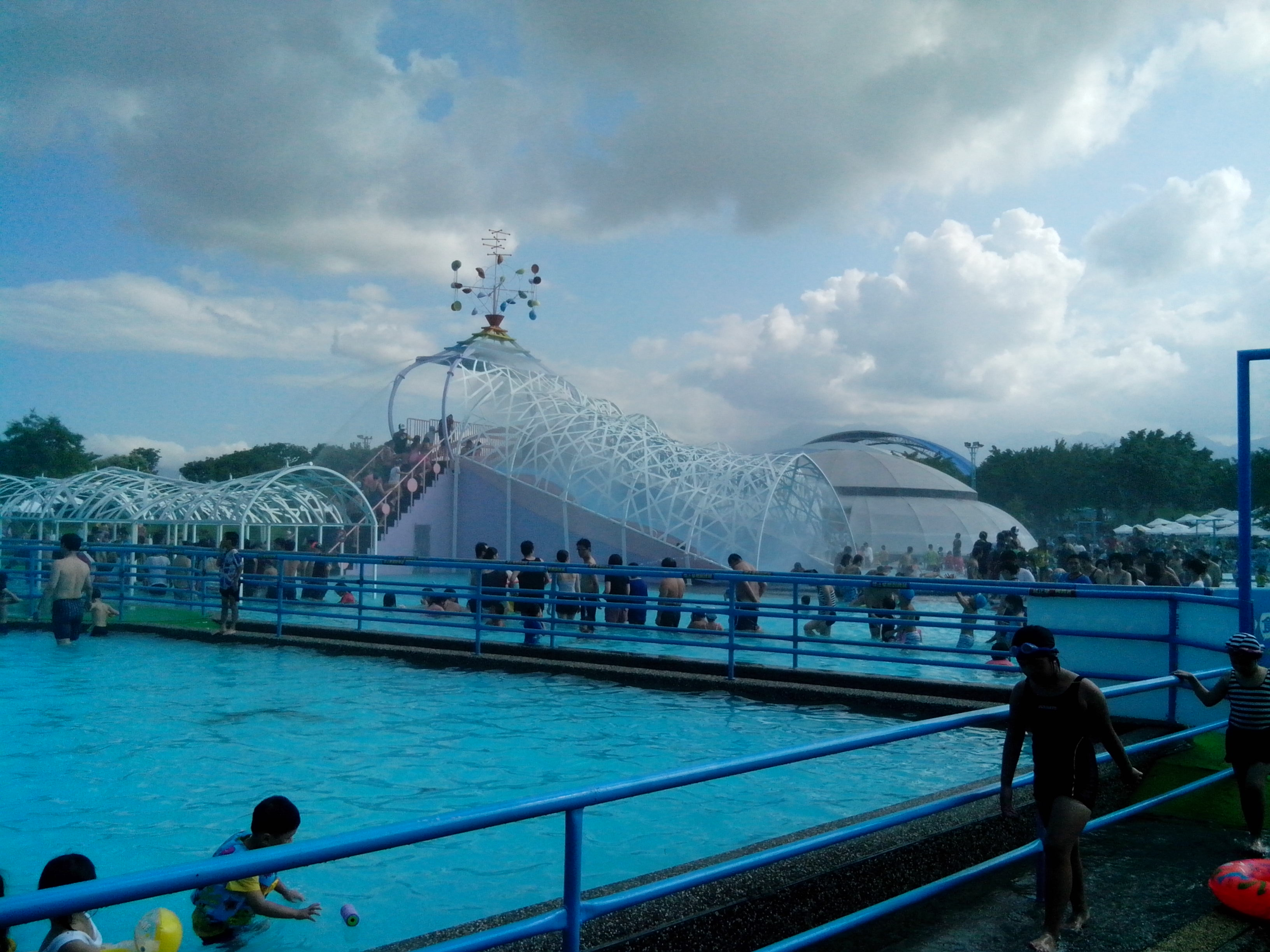 2013年宜蘭國際童玩藝術節 水上遊戲區